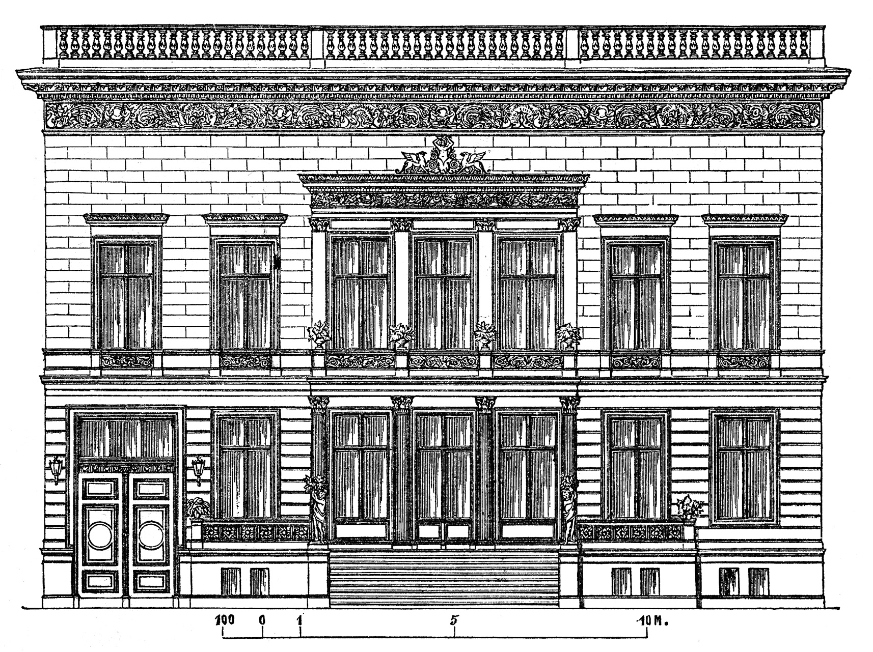 Berlin - Wohnhaus „Anker“ von Christian August Hahnemann, Bellevuestraße 19A, abgebrochen für das Weinhaus Rheingold 1905